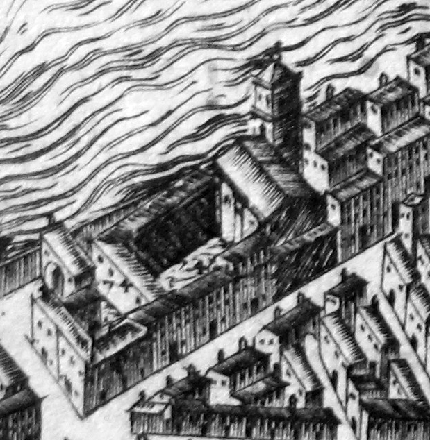 Pianta del buonsignori, dettaglio 074 san iacopo sopr'arno